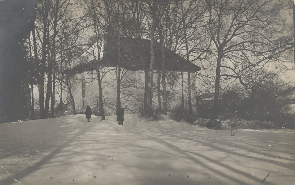 Kuusiku nn "Munga ait" enne teist maailmasõda. Foto Jaan Vali kogust.